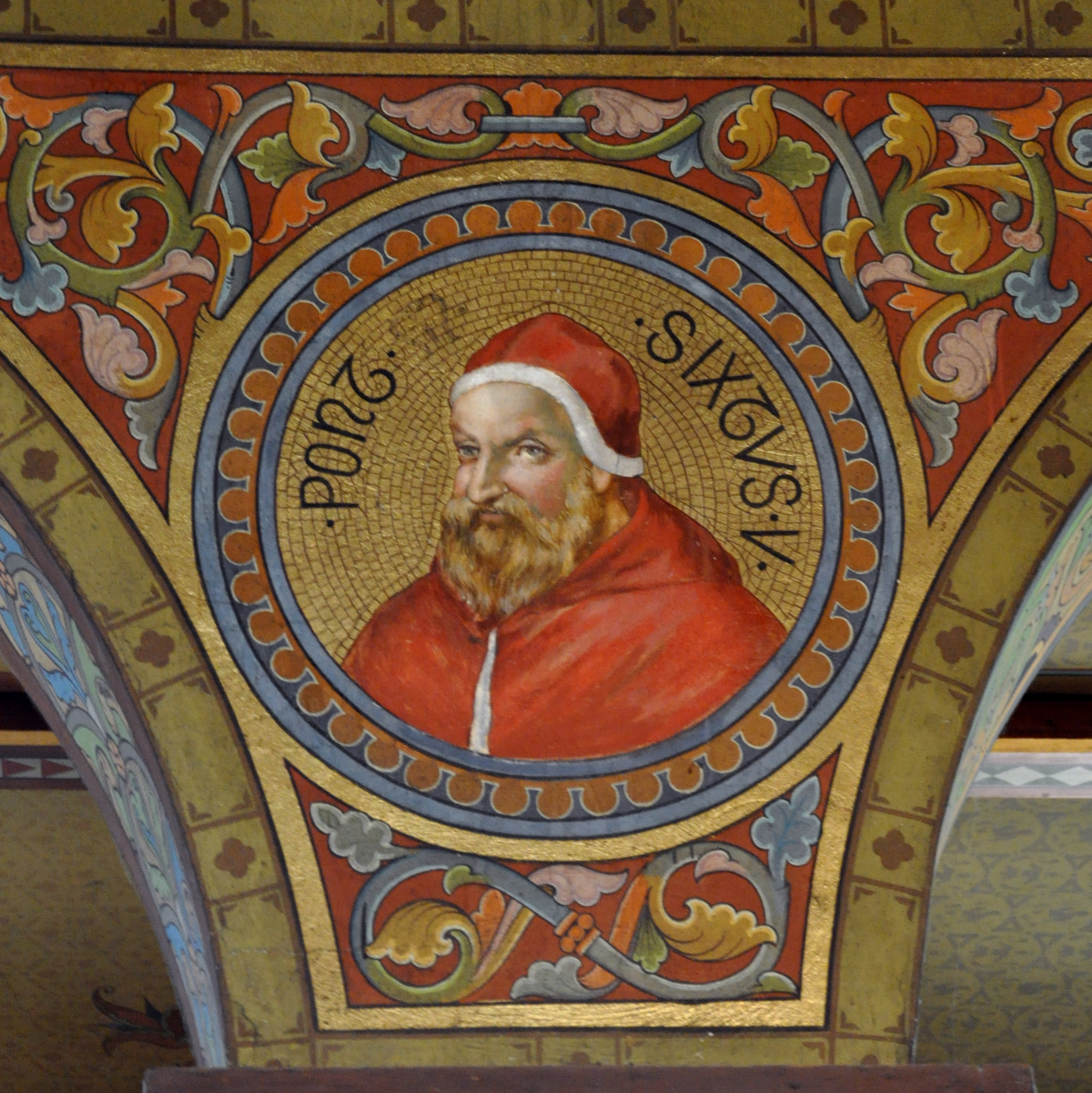 Kloster Mehrerau, Bregenz, Vorarlberg; Collegiumskapelle; Bildnisse von Päpsten (in den Arkadenzwickeln) und zugehörige Wappen; Sixtus V.